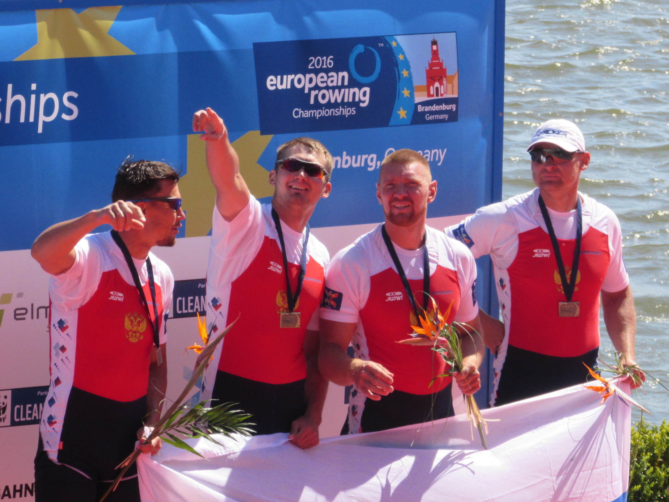 Nikita Morgatschow, Artjom Kossow, Wladislaw Rjabzew, Sergei Fedorowzew, Ruder-EM 2016